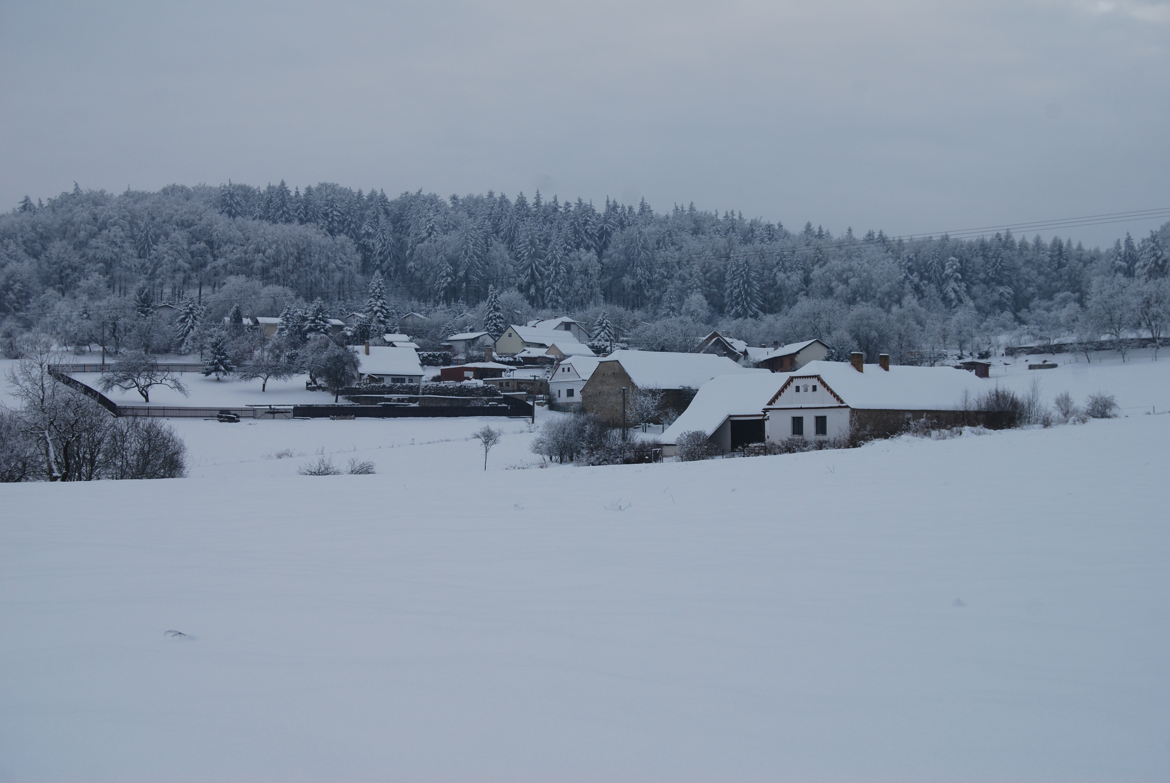 Horní Novosedly je část obce Dolní Novosedly v okrese Písek. Česká republika.